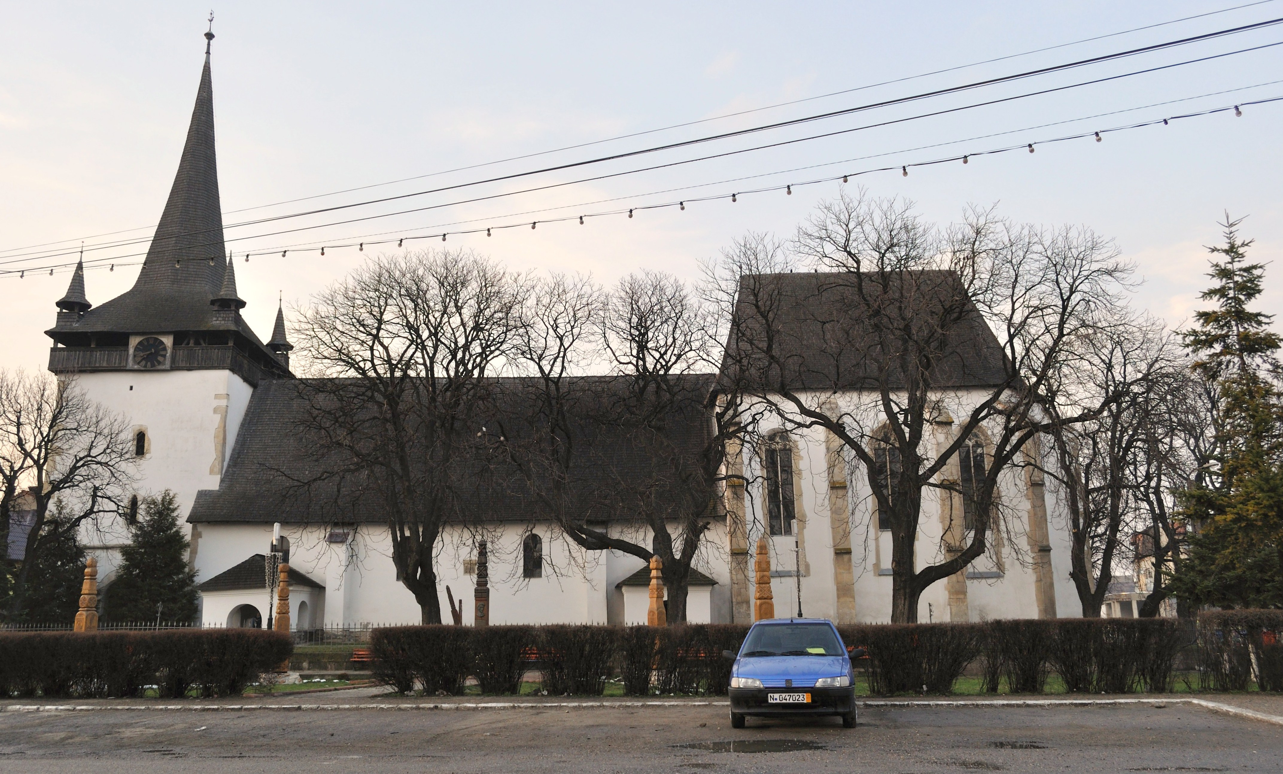 Biserica reformată din Huedin